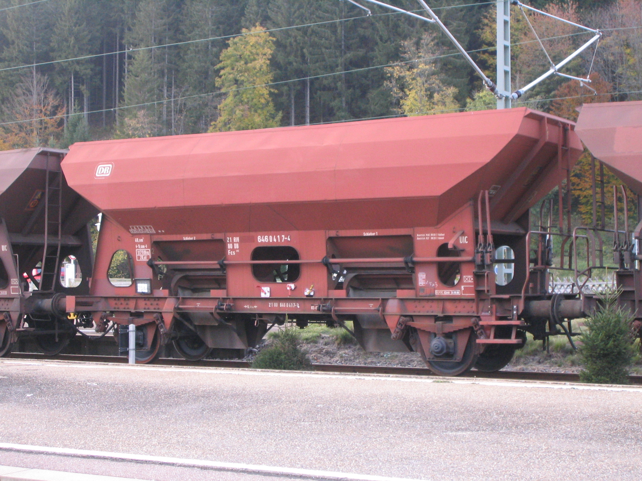 Drehschieber-Seitenentladewagen in Titisee